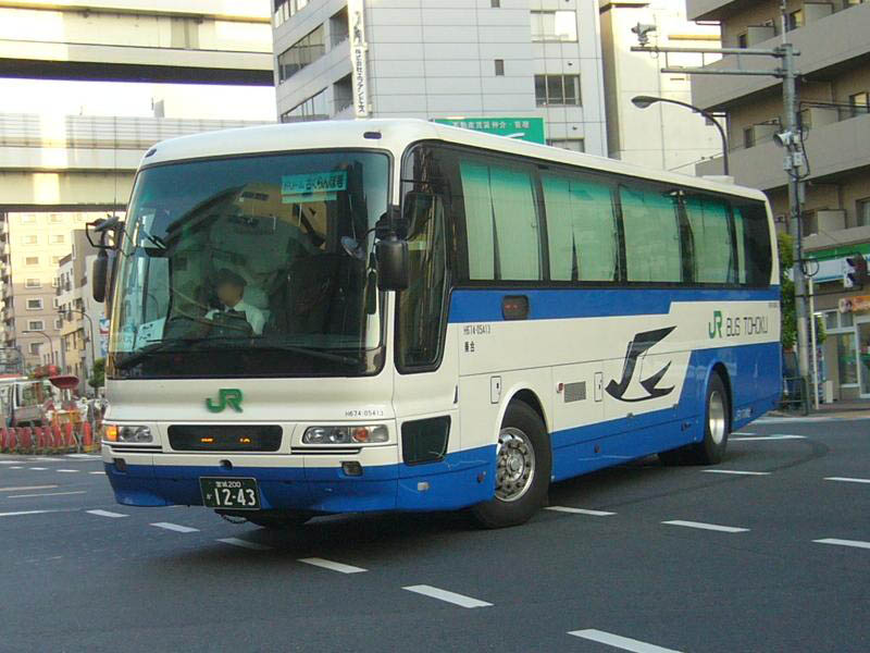 登録番号 宮城200か12-43 ジェイアールバス東北(JR Bus Tohoku)所属 高速用車両 （各系統で共通運用） 三菱ふそう・エアロバス KL-MS86MP